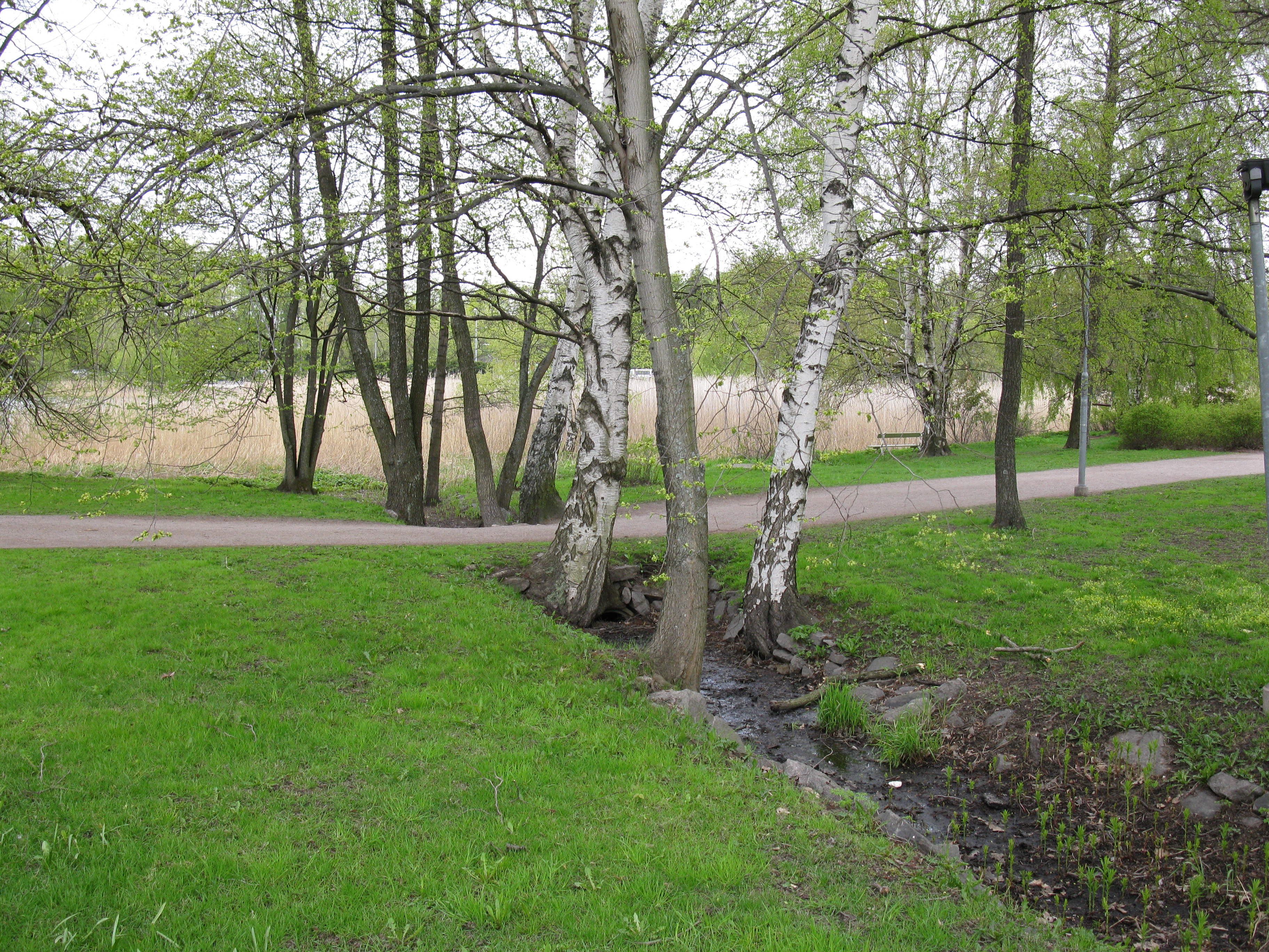 Töölönlahhden rantatie Eläintarhassa Helsingissä. Paikka esiintyy taustana Hugo Simbergin maalauksessa Haavoittunut enkeli.